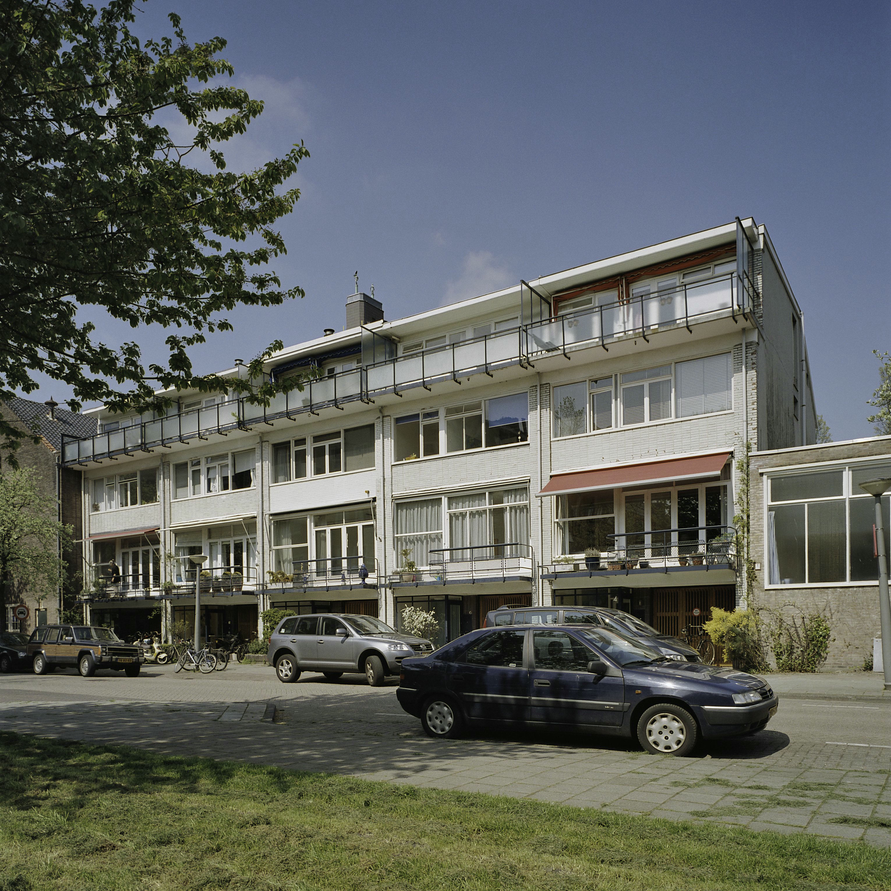 Oud-Zuid: Overzicht voorzijde van drive-in woningen en op de vierde bouwlaag een balkon (opmerking: Gefotografeerd voor Monumenten In Nederland Noord-Holland)